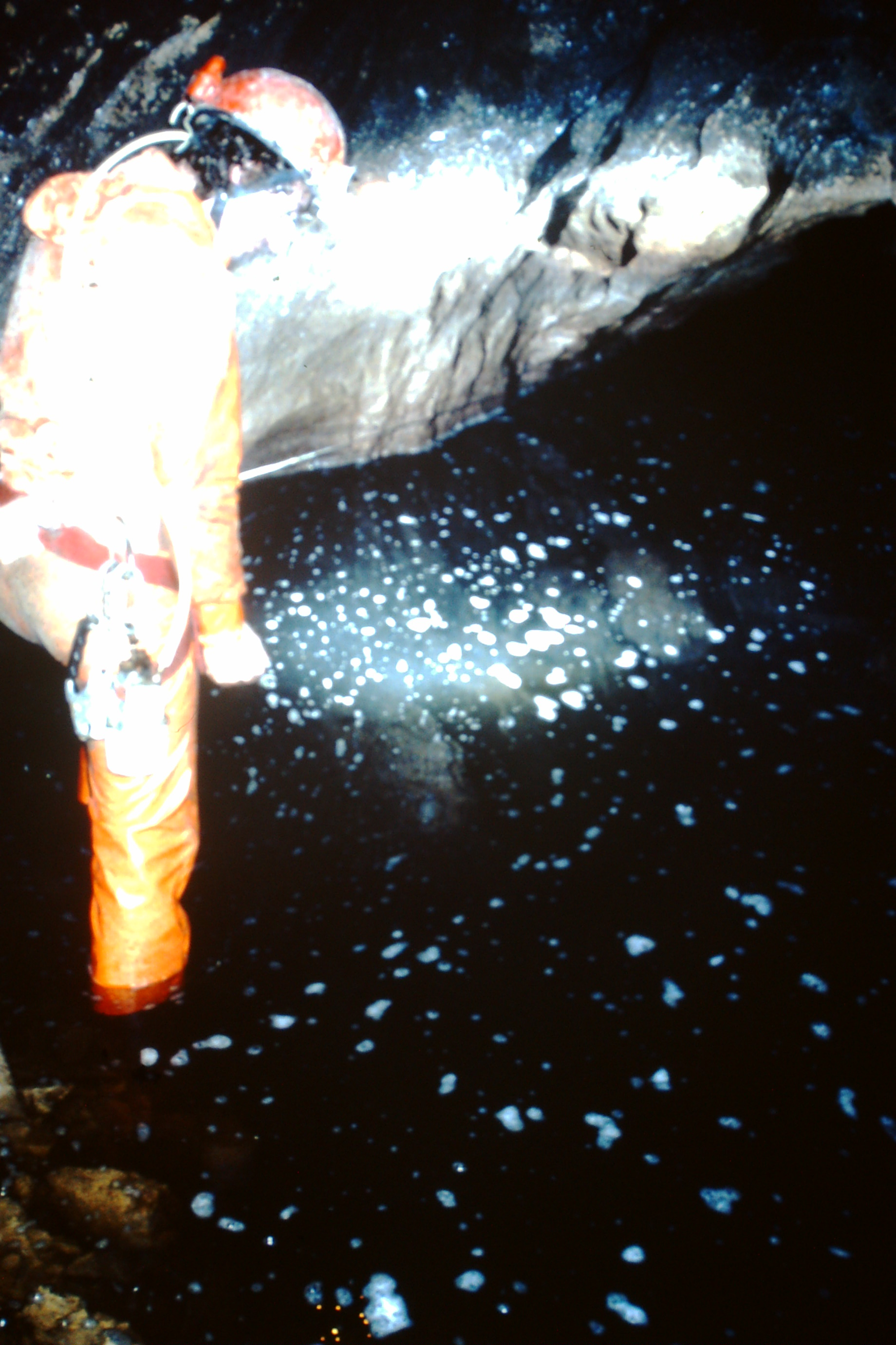 VUILLAFANS (25)